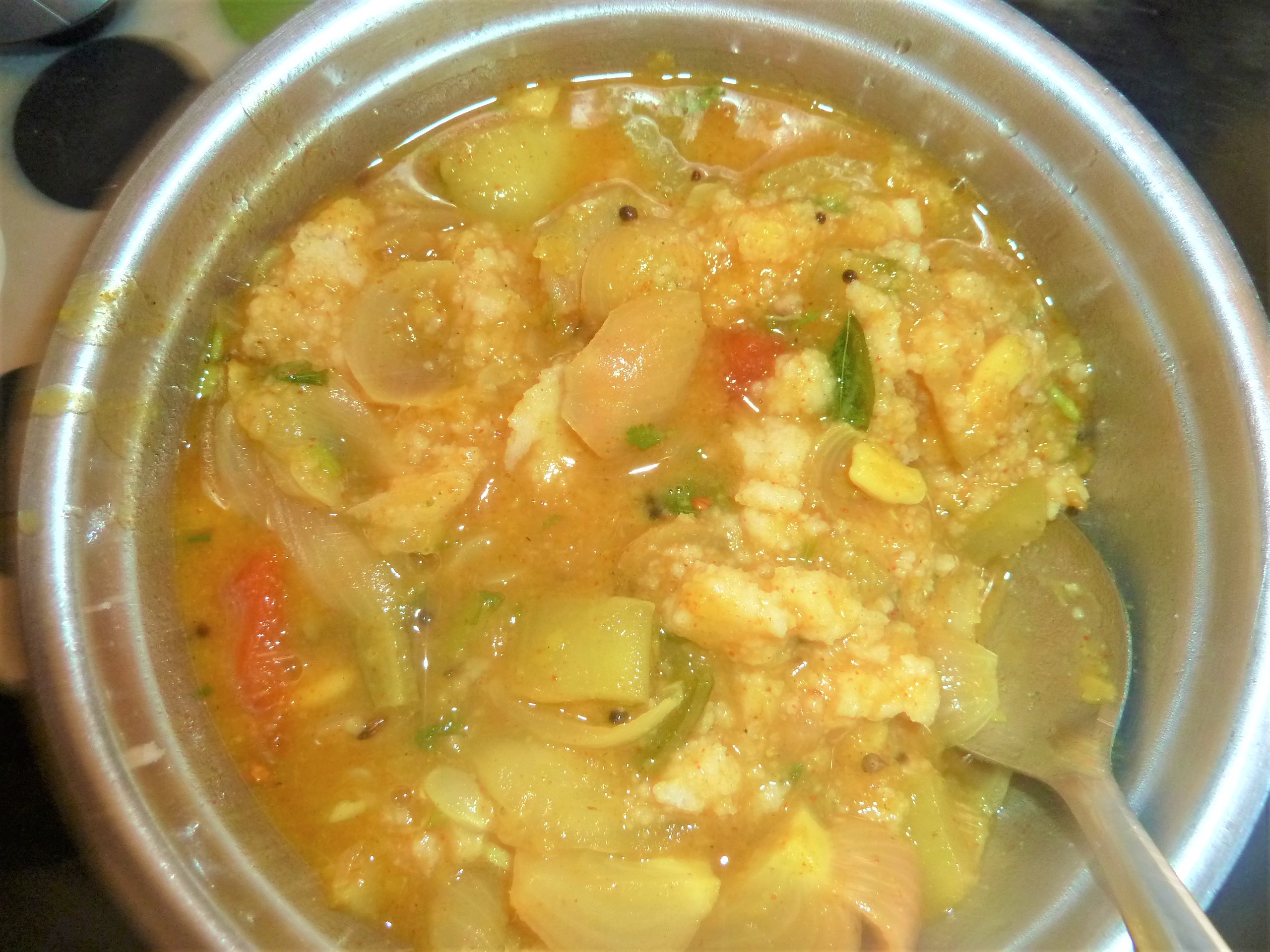 ఇడ్లీ సాంబార్